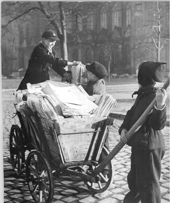 Zentralbild-Rösener, 24.3.1955 Für Altpapier ins Ferienlager: Aus Haushalten und Verwaltungen holten Junge Pioniere der Maxim-Gorki-Schule in Magdeburg Altpapier, Knochen und andere Altstoffe zusammen. Für den Erlös des Verkaufs an die Erfassungsstelle wollen sie ins Ferienlager fahren. Durch Alstoffsammlungen wollen die Magdeburger Thälmann-Pioniere ausserdem 20 000.-- DM für die Einrichtung einer Landarztstation in Korea zusammenbringen.